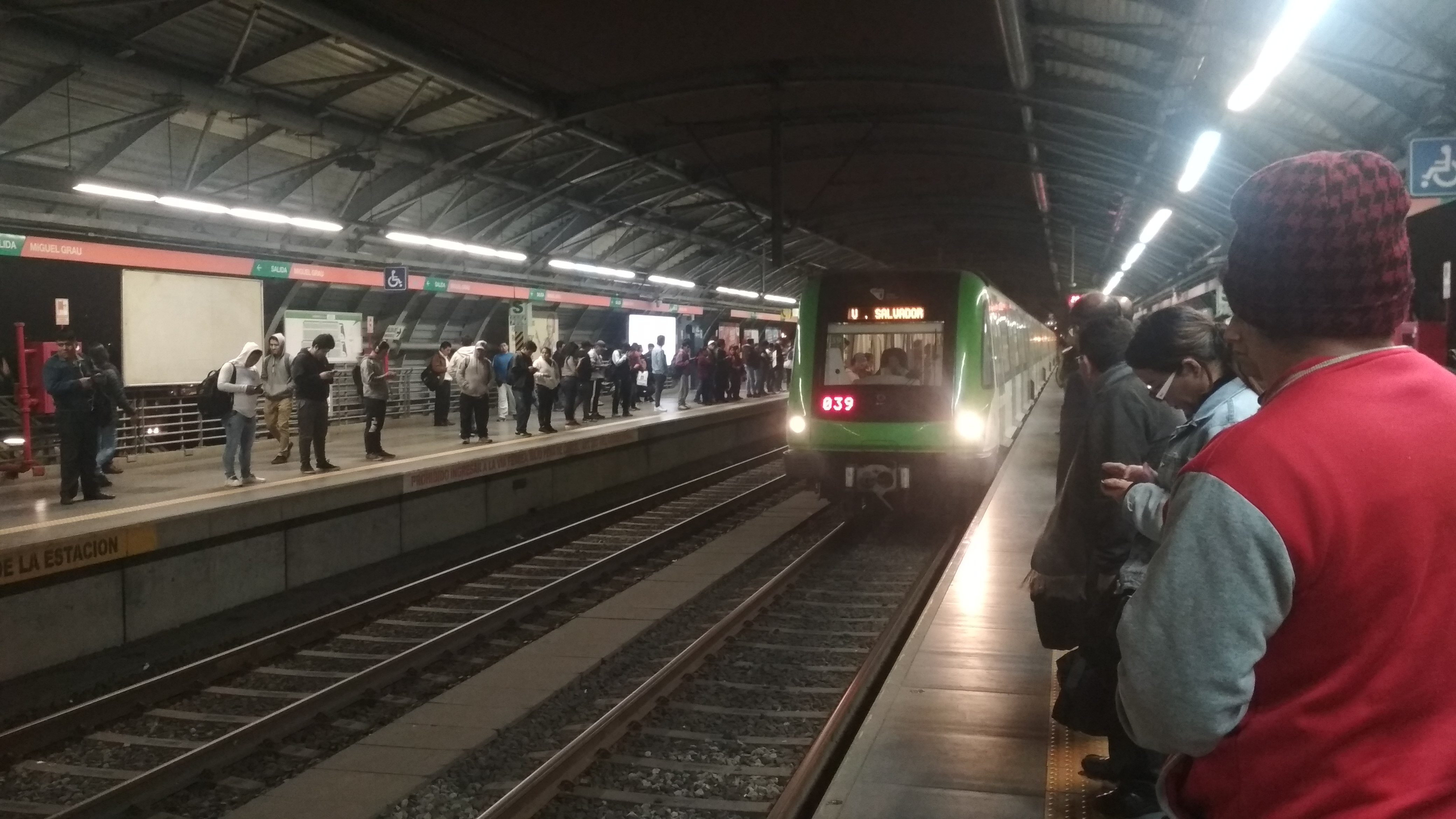 tren entrando a la estación Miguel Grau en dirección a Villa El Salvador. Línea 1 del Metro de Lima